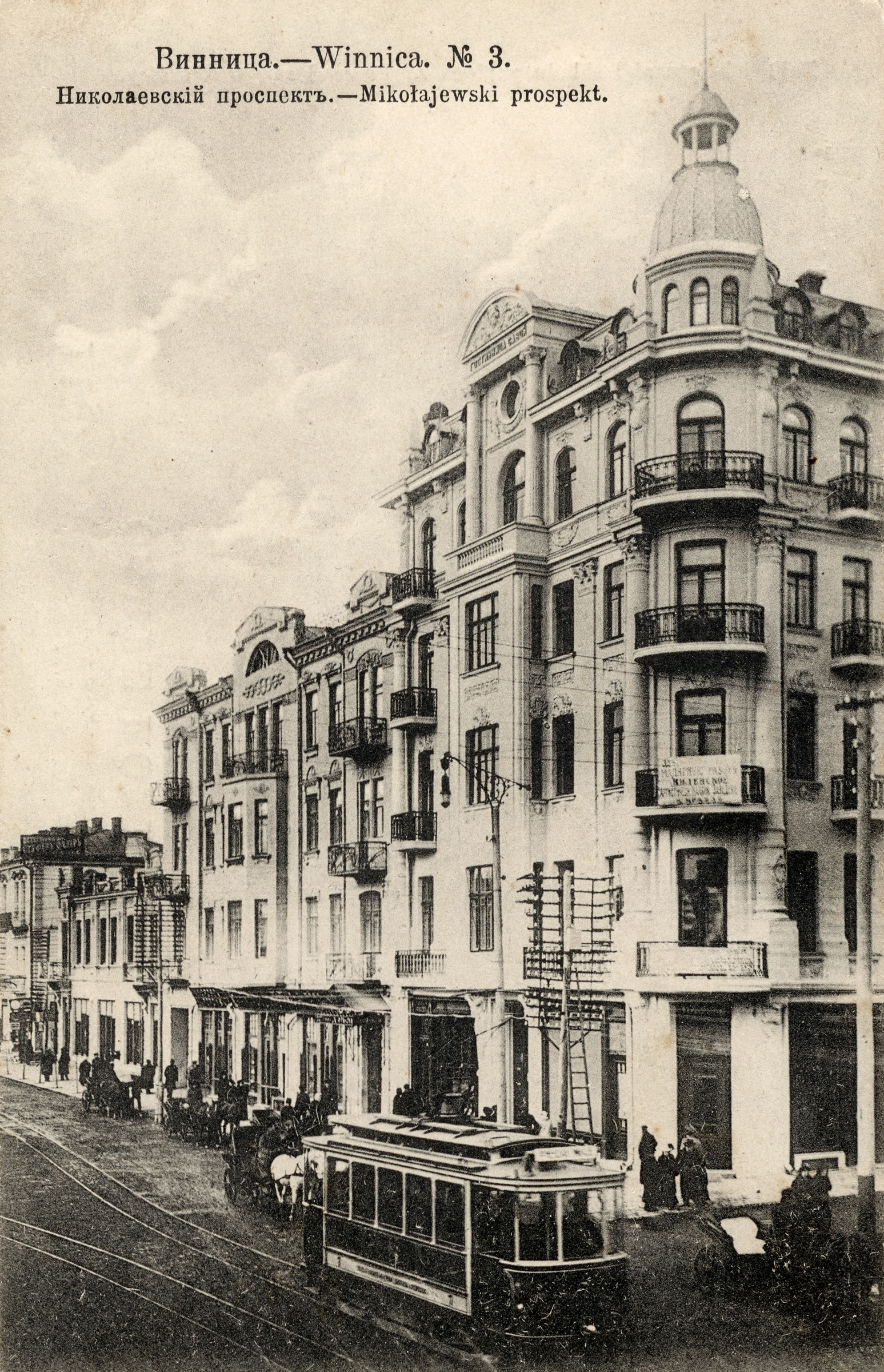 Nikolayevsky prospekt in Vinnytsia, Ukraine in mid 1910s